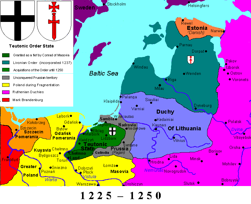 Vokiečių ordino plėtra iki 1250 m.